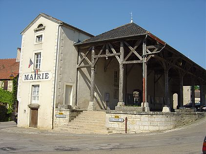 Halles de 1491 (XVe siècle)